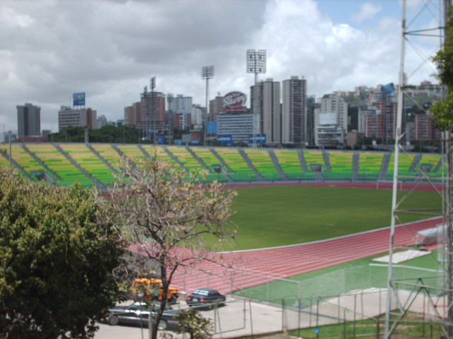 Vista del Olímpico de la UCV